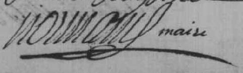 Signature de l'acte par le maire NORMAND Germain